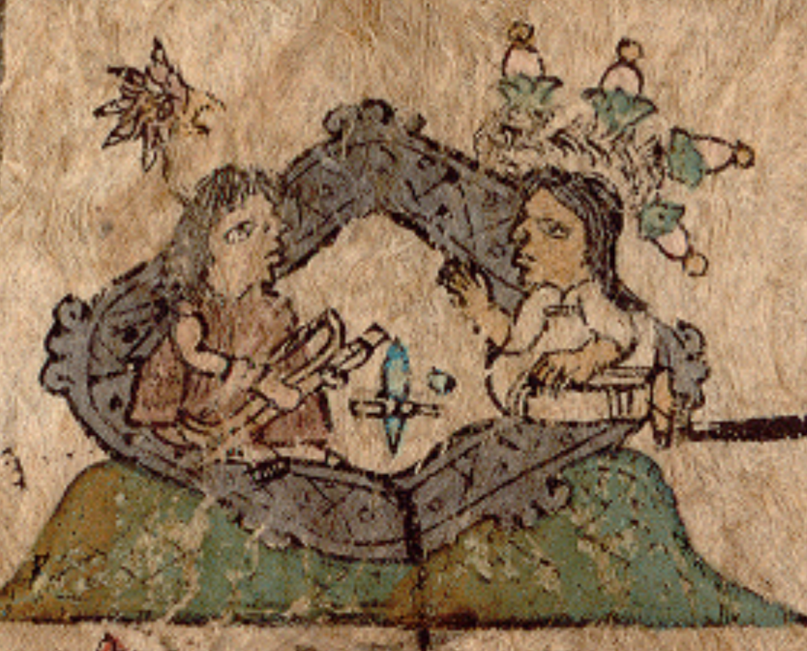 Fragmento de la lámina 4 del Códice Xolotl donde aparece el tlatoani Tlotzin con su esposa Pachxochitzin.